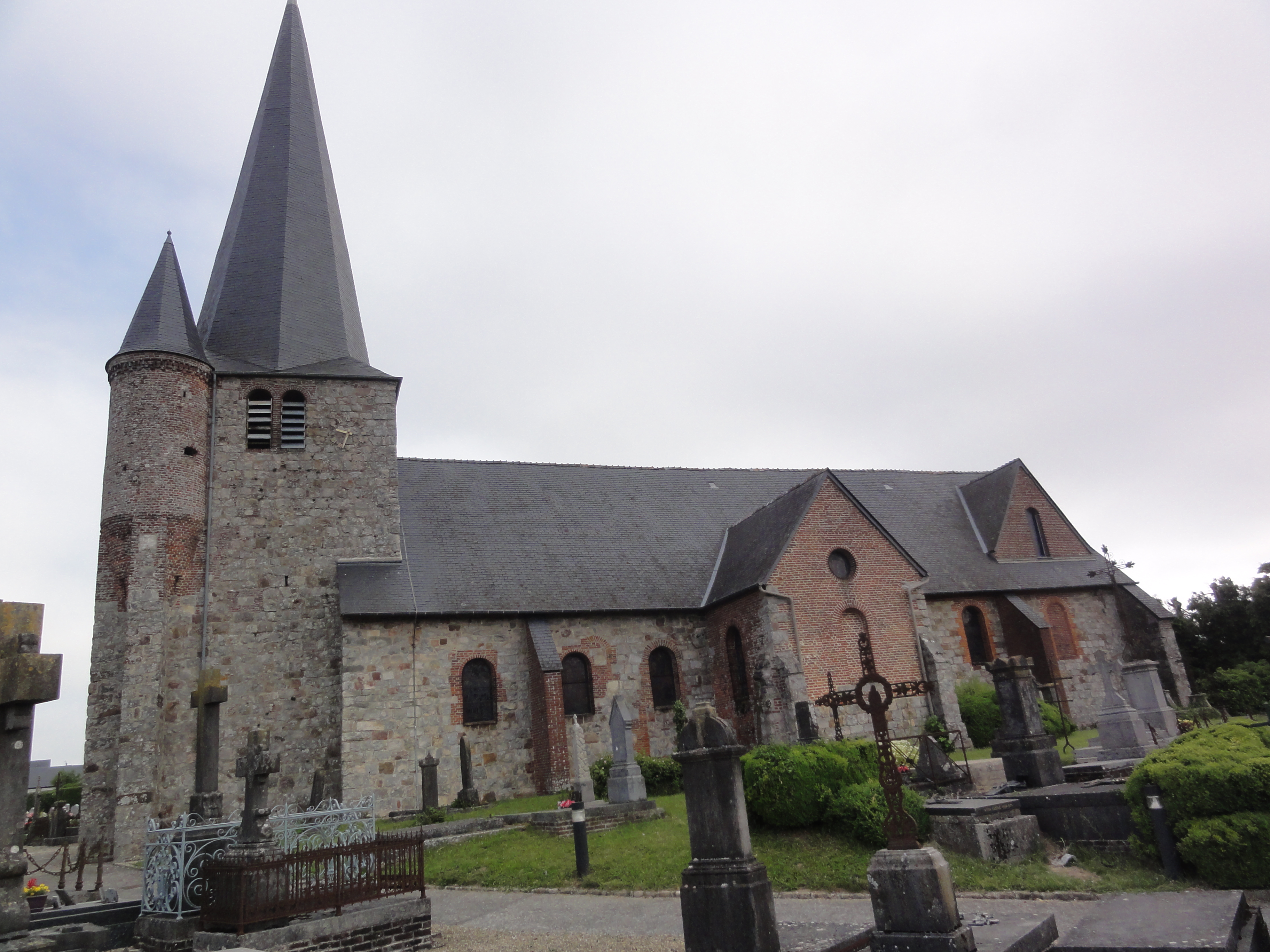 Fontaine-lès-Vervins (Aisne), église vue latérale sud